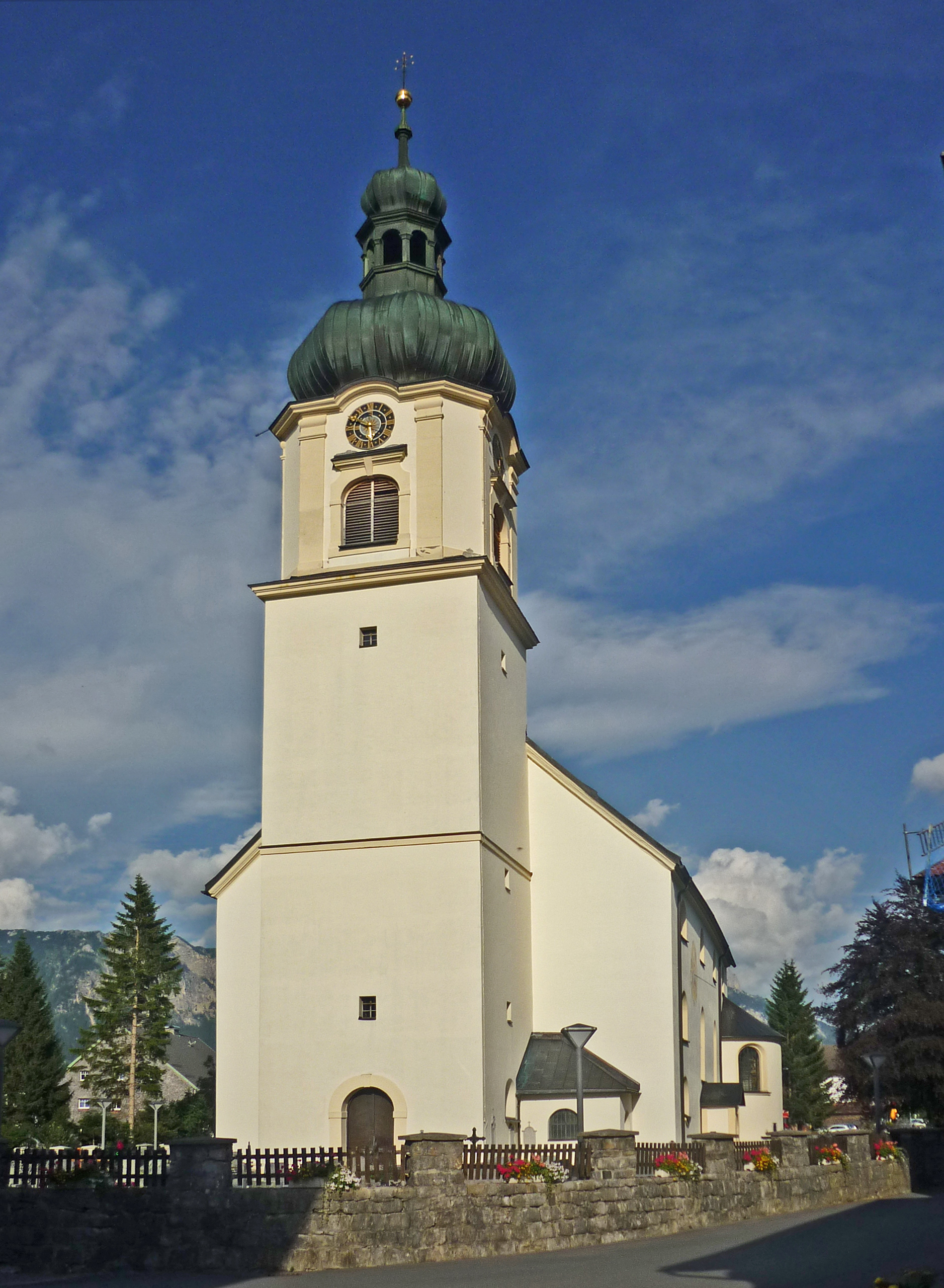 Kath. Pfarrkirche hl. Nikolaus in Tannheim (Tirol) am Jakobsweg Tirol – Allgäu.